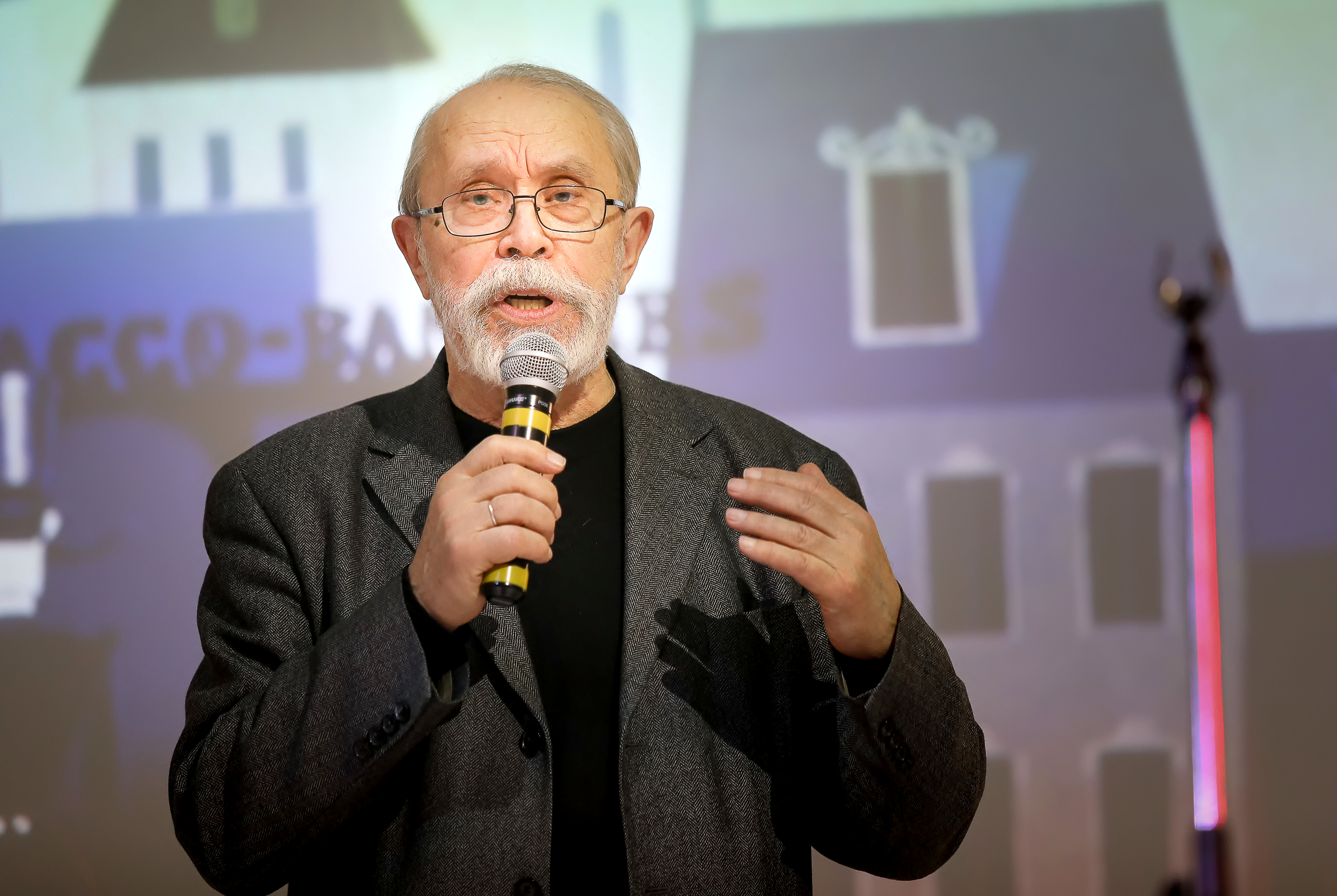 Народный художник РФ Сергей Александрович Алимов на открытии выставки в Российской государственной детской библиотеке.